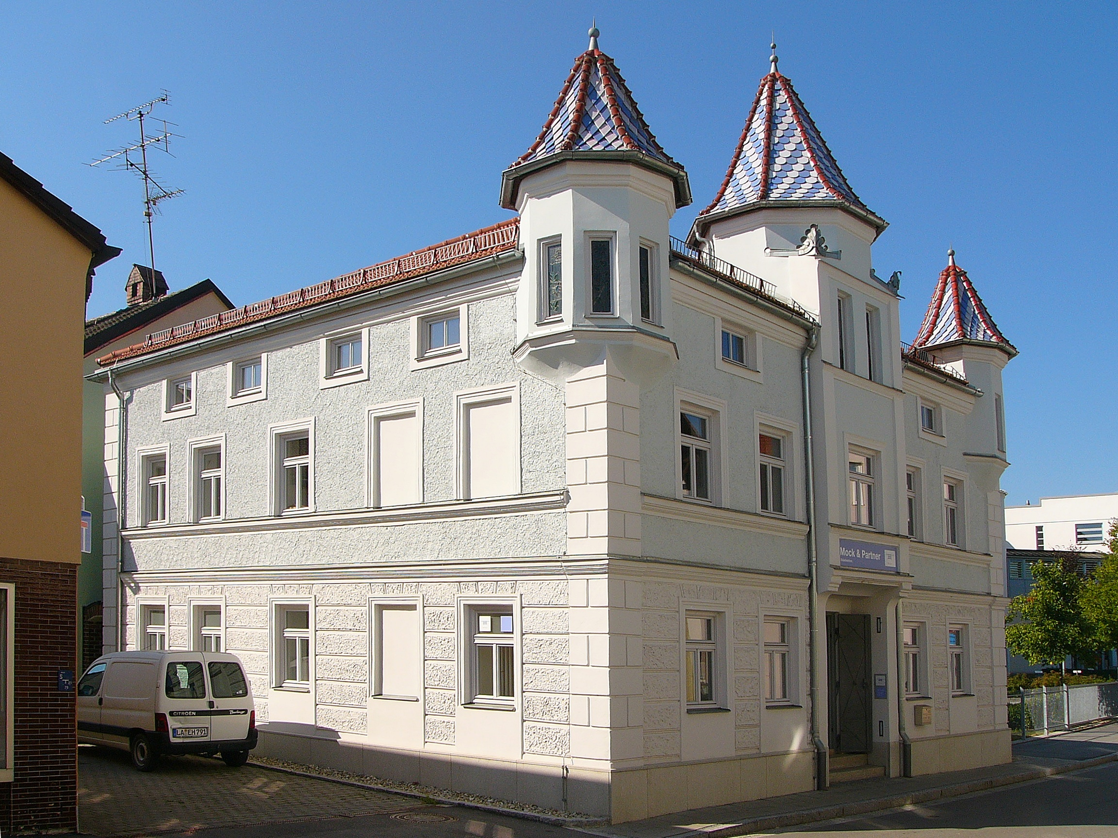 Wohn- und Geschäftshaus; zweigeschossiges Gebäude mit Kniestock und Zeltdach, nördlich drei Turmerker mit Zeltdach, mit rustiziertem Sockelgeschoss, rustizierten Ecklisenen und Putzgliederungen, neubarock, um 1900.This is a photograph of an architectural monument.